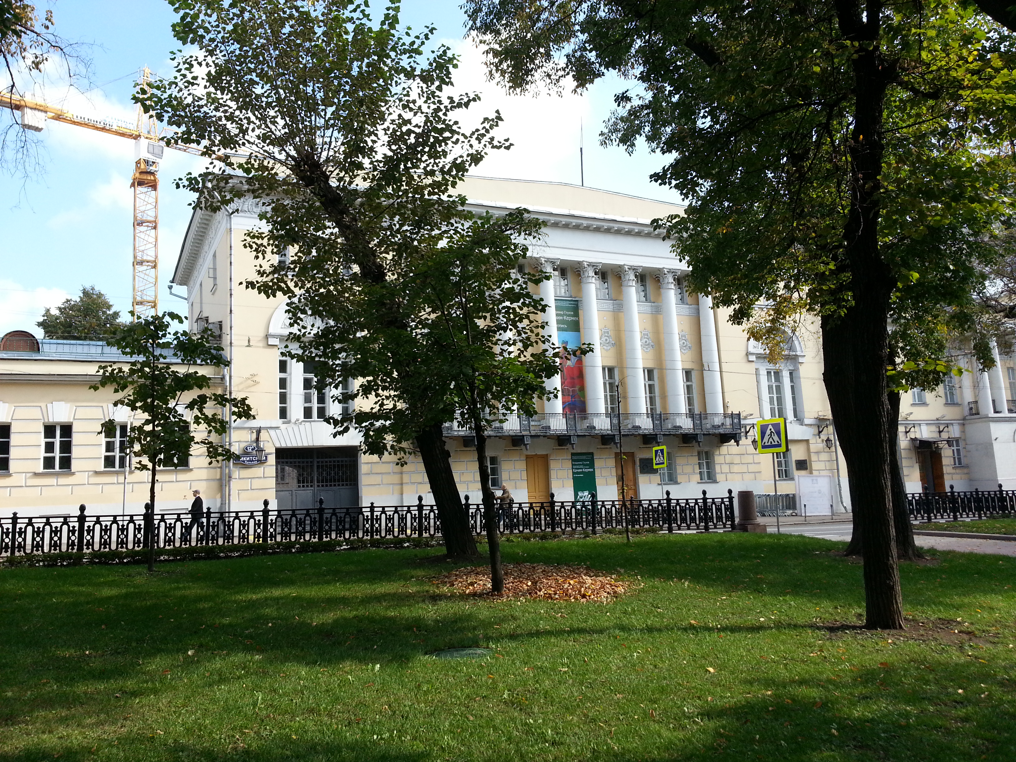 Усадьба Луниных (музей Востока) (Москва и Московская область, Москва, Никитский бульв., 12-а)